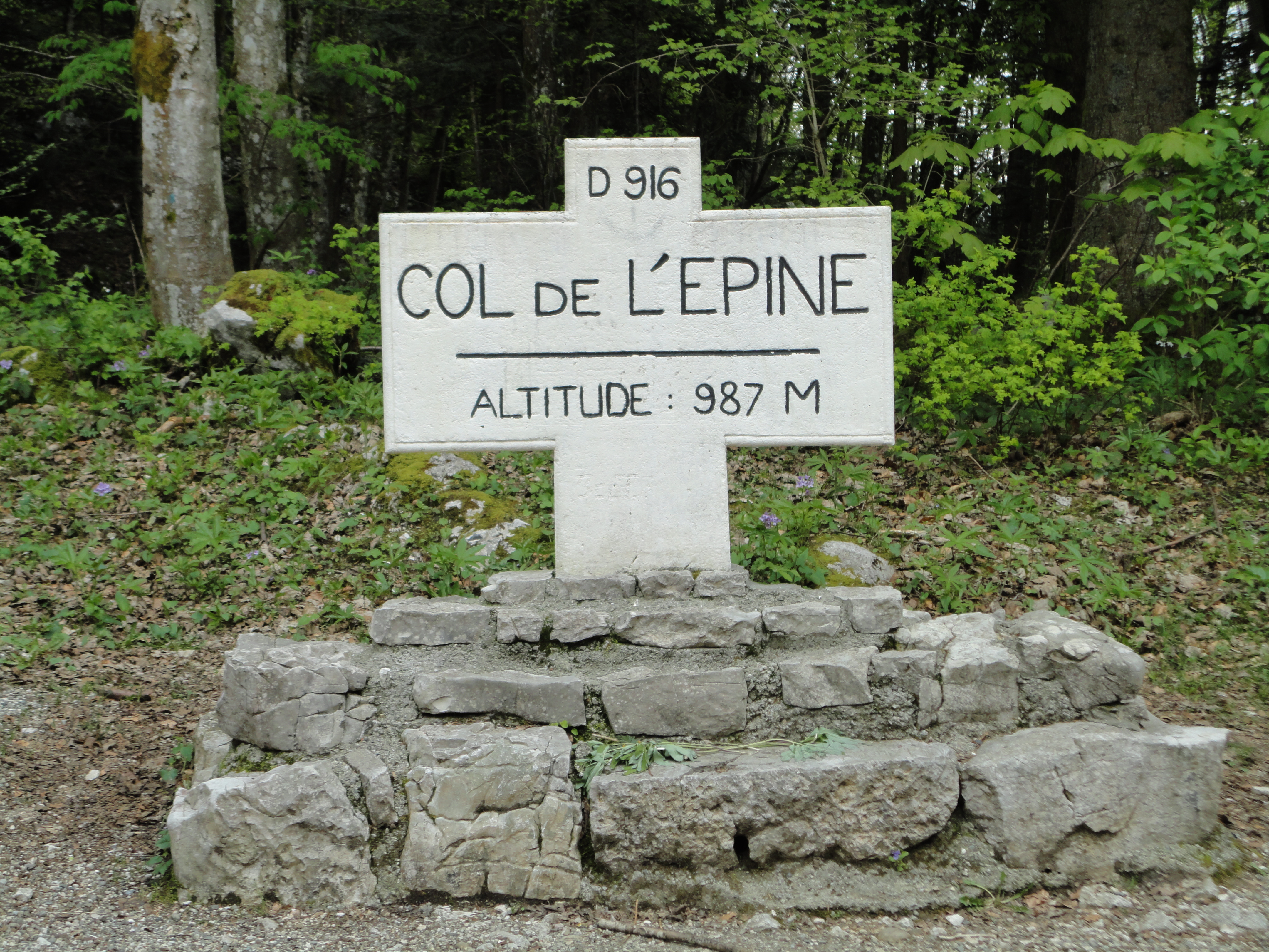 Panneau au sommet du col de l'Epine